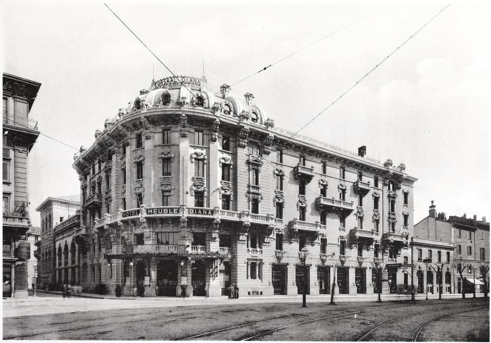 Il Kursaal Diana in Milano - vista generale dell'esterno (1909), da L'Architettura Moderna.